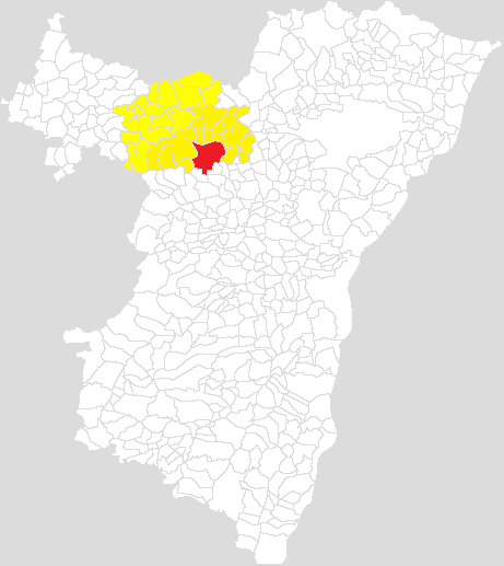 Cartographie